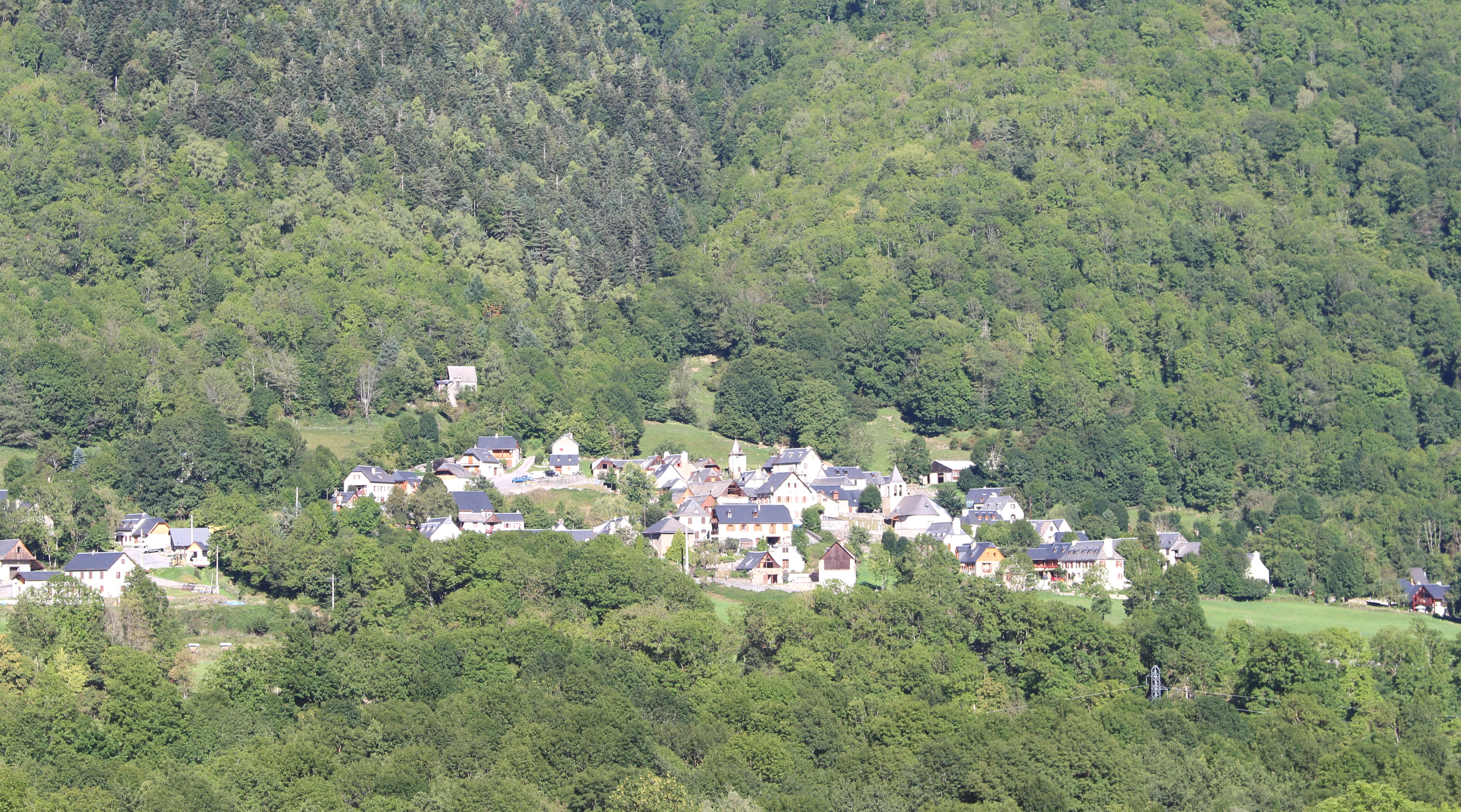 Vielle-Louron (Hautes-Pyrénées)